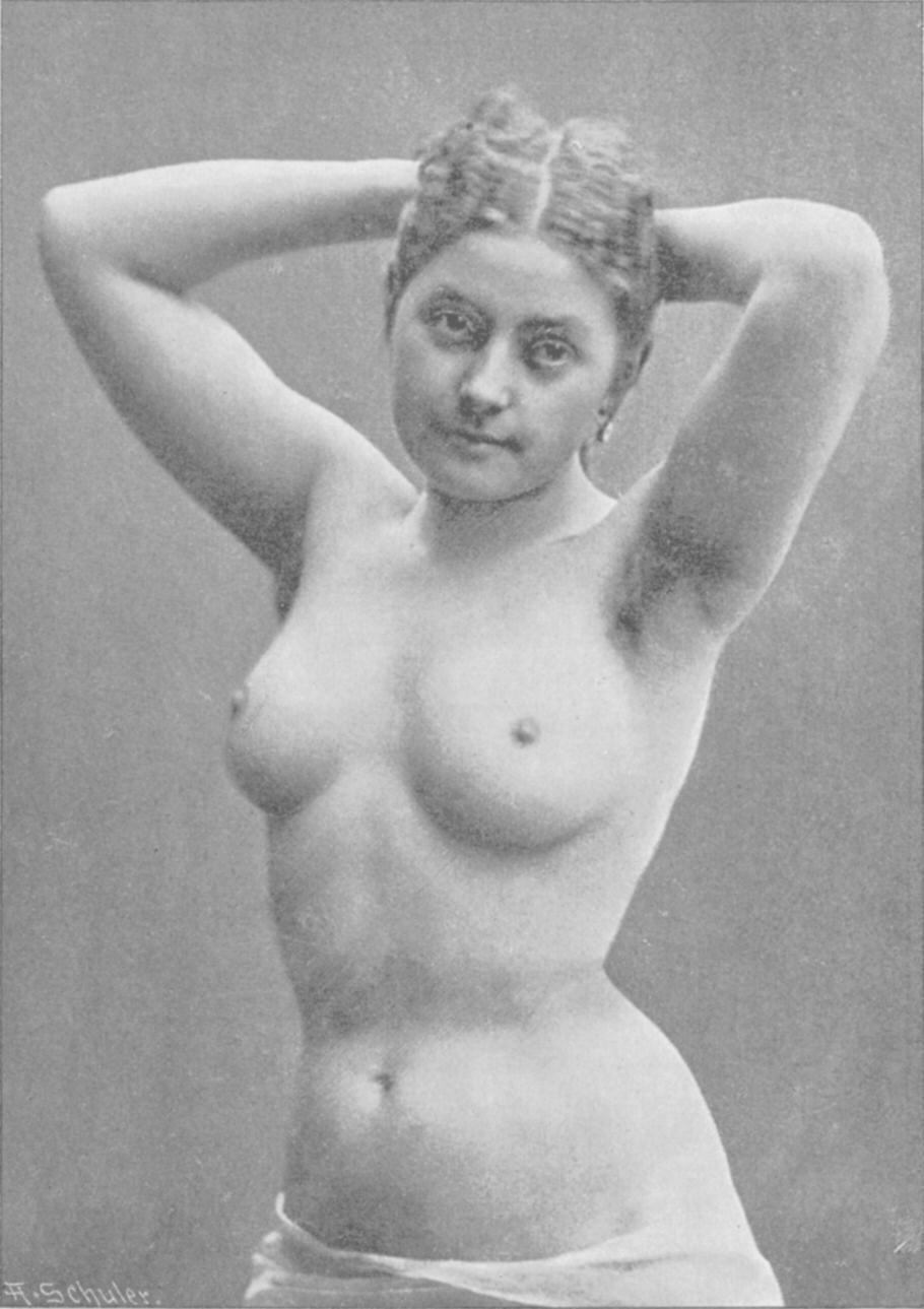 Fig. 256. Taille mit starker Schnürfurche. Hängebauch.